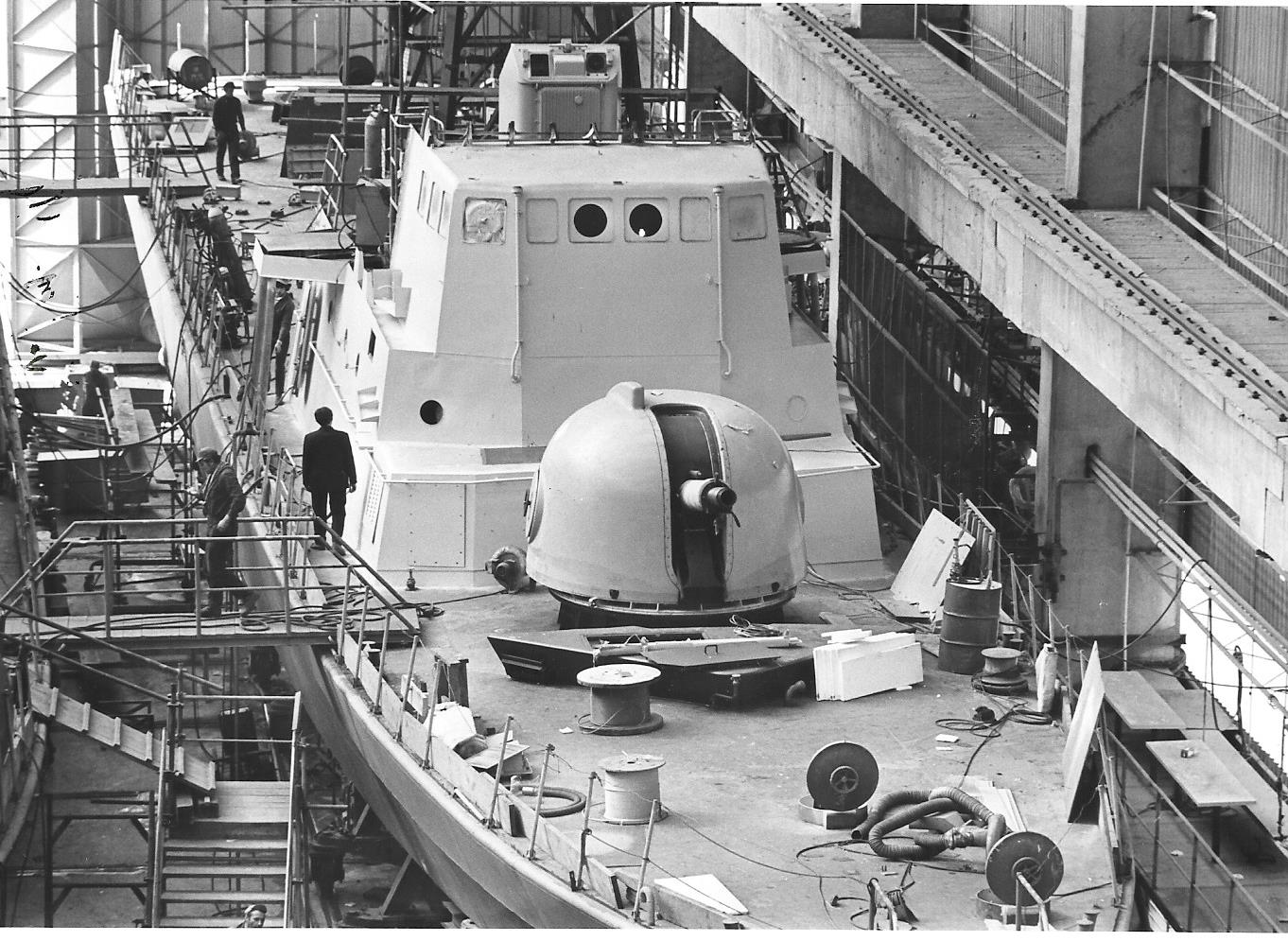 בנית אח"י רשף במספנות ישראל 1972